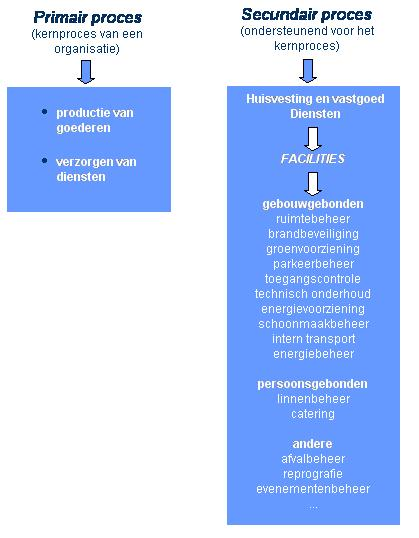 Secundair proces facility Management